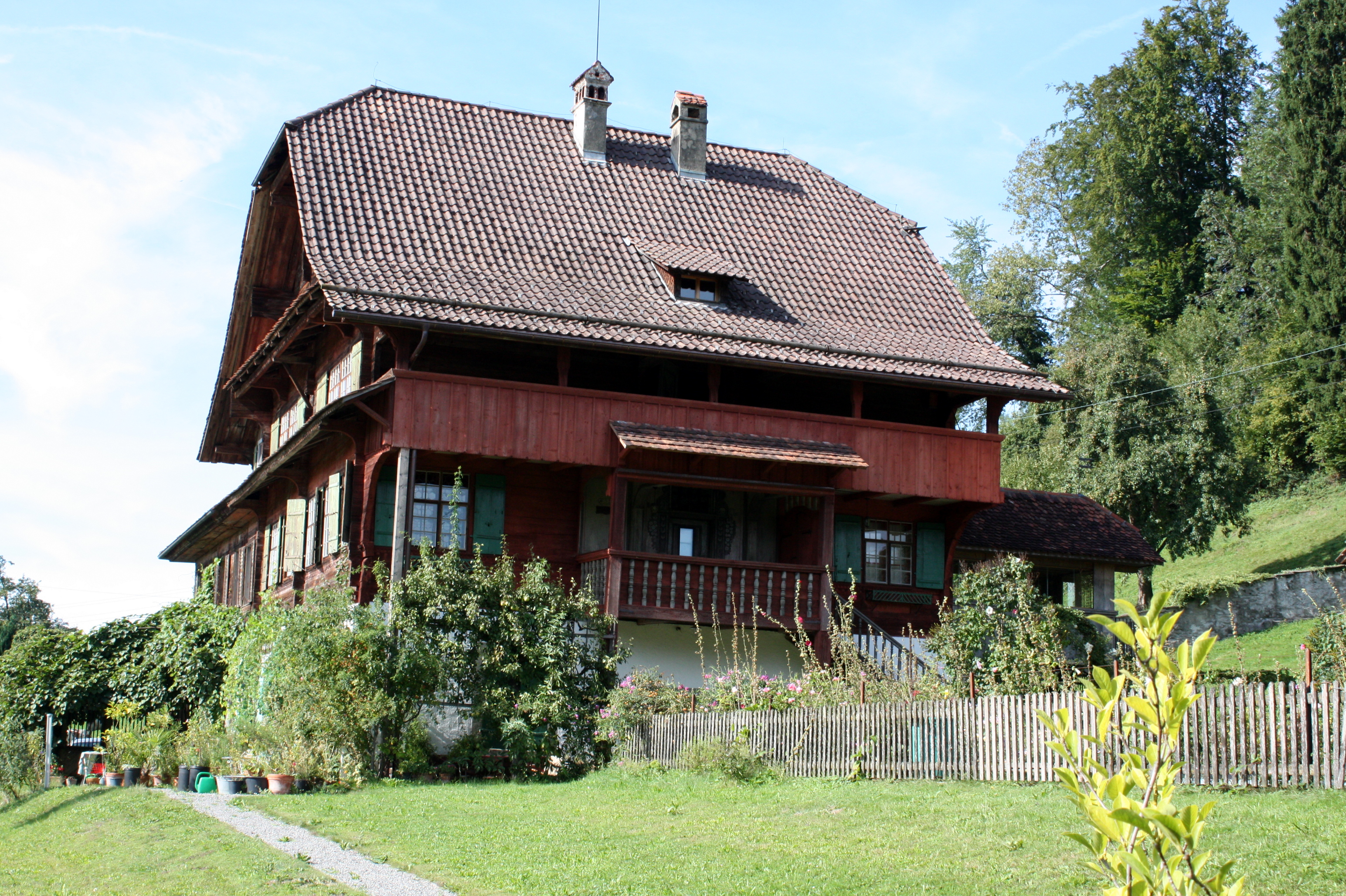 Dierikon, Schlössli Götzental